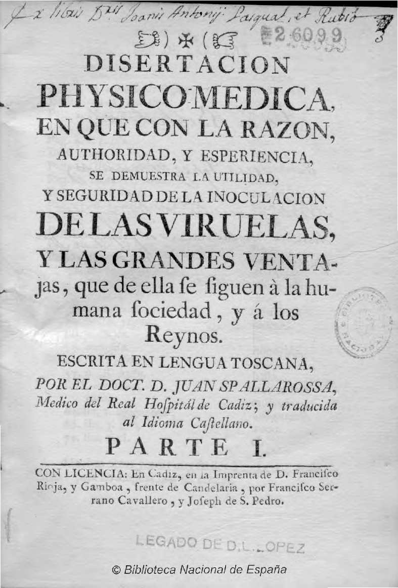 Disertacion physico medica, en que ... se demuestra la utilidad y seguridad de la inoculacion de las viruelas, y las grandes ventajas, que de ella se siguen à la humana sociedad ... escrita en lengua toscana por ... Spallarossa ... ; y traduccida al idioma castellano ; Parte I [ III] Autor: Spallarossa, Giovanni Fecha: entre 1766 y 1767 Datos de edición: En Cadiz en la Imprenta de D. Francisco Rioja y Gamboa ... por Francisco Serrano Cavallero y Joseph de S. Pedro Fecha de impresión deducida de la aprobación, fechada en 1766 y de los Imprimatum de la segunda y tercera parte, fechados en 1767